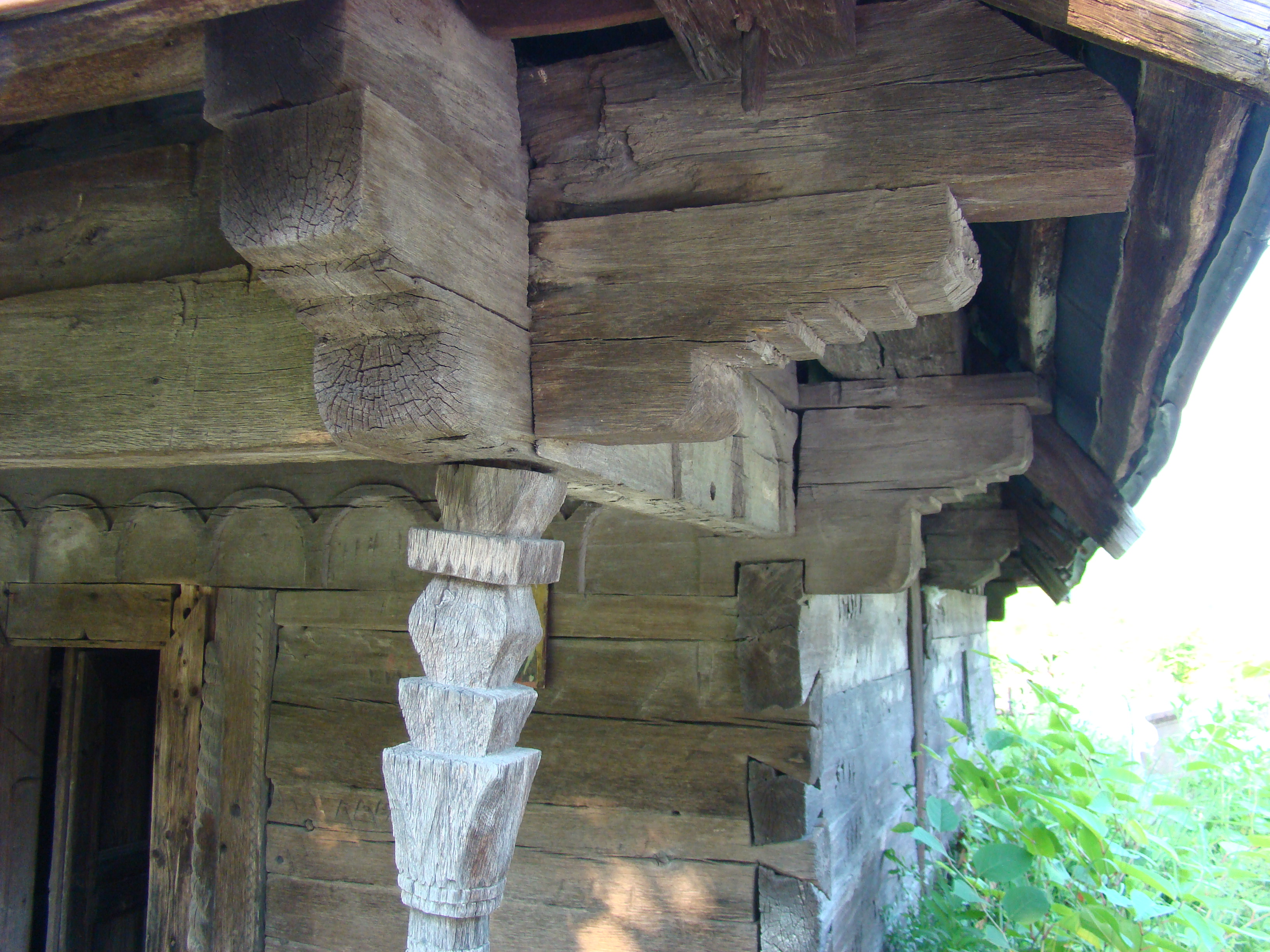 Biserica de lemn „Sf.Voievozi”, sat Pârâu Viu, cătun Glăveni, județul Gorj